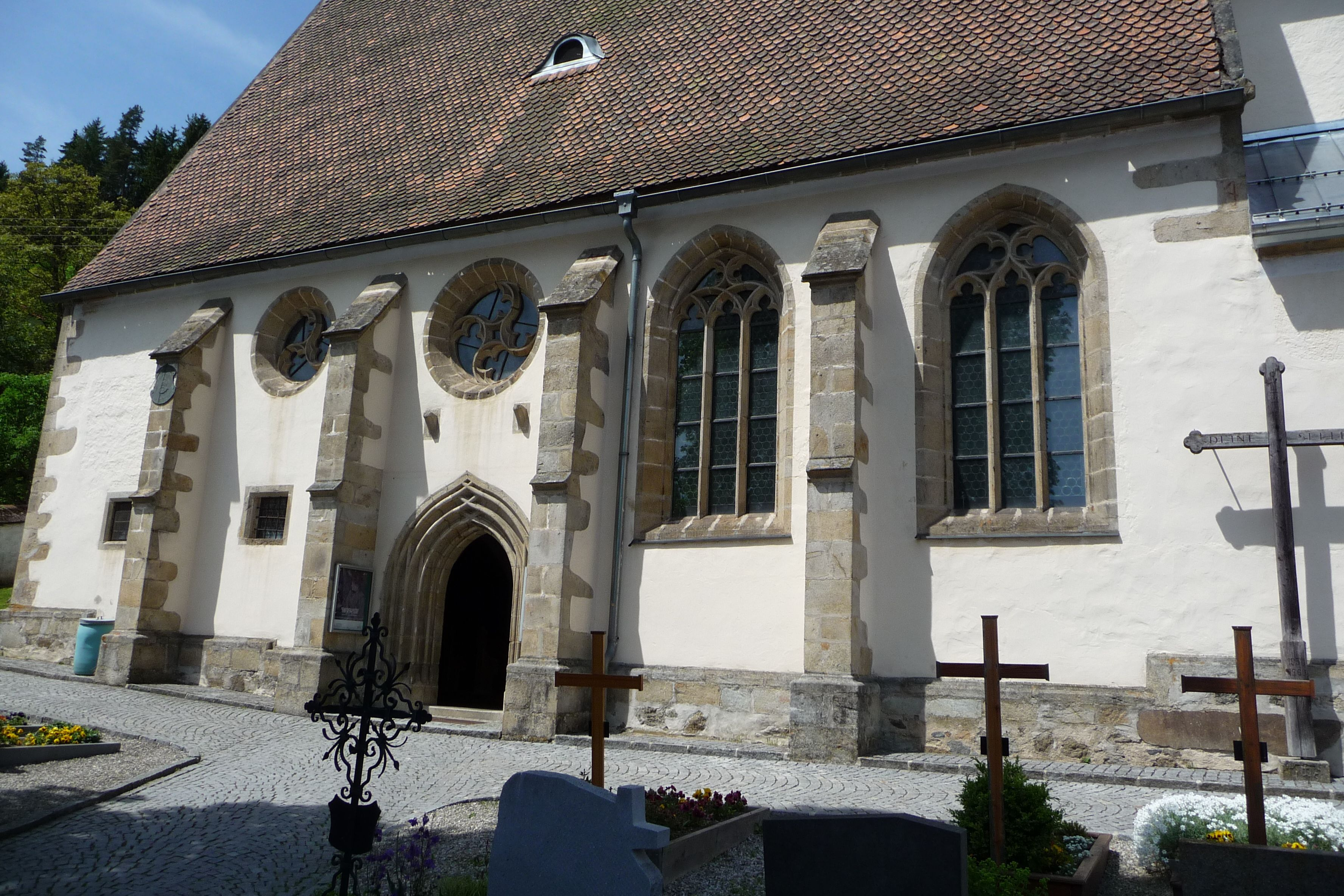 Langhaus der Pfarrkirche Hirschbach Mkr.